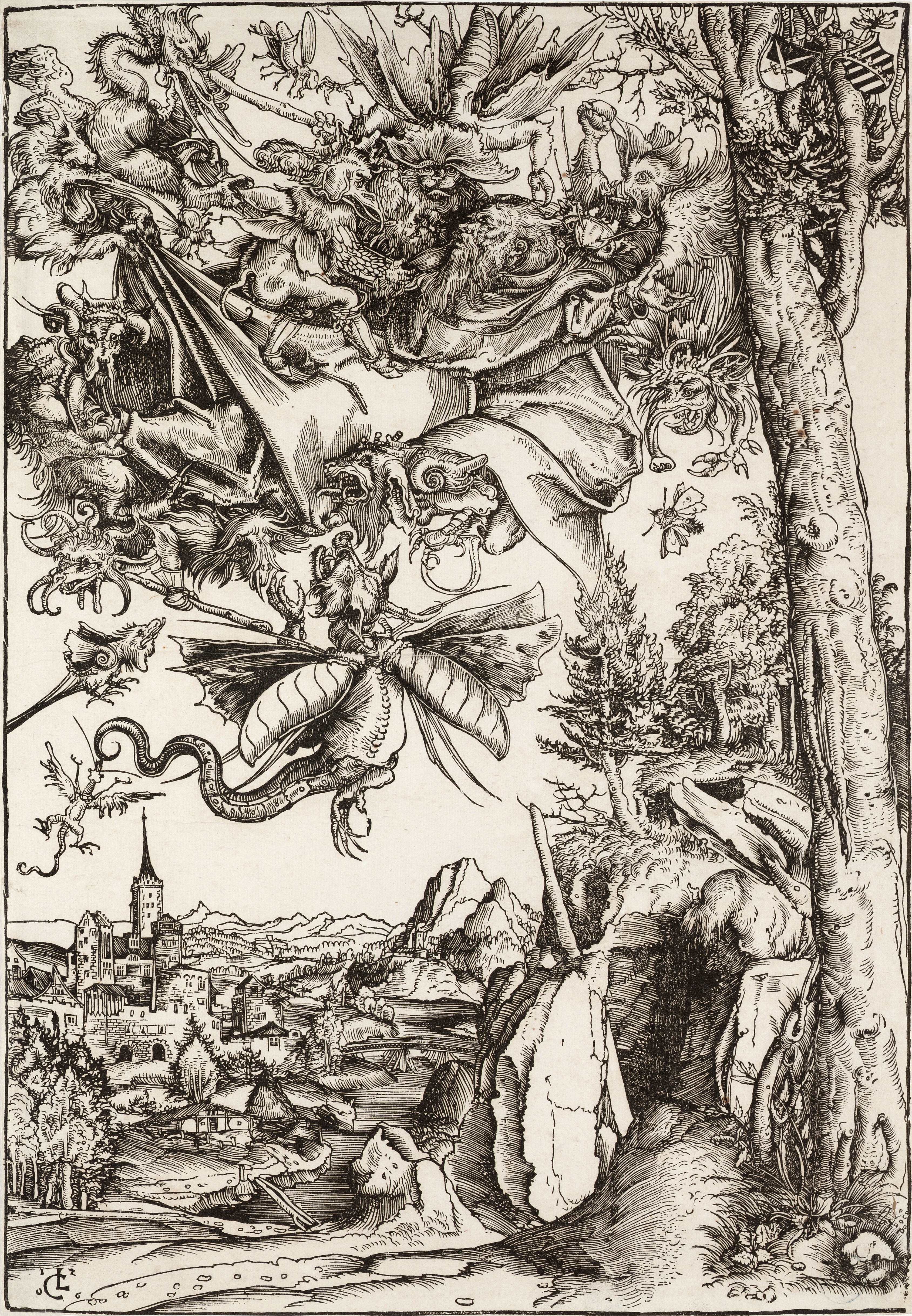 Lucas Cranach starší: Svatý Antonín nesený démony (1506), dřevořez, II. stav, papír s filigránem, 417x280 mm, Národní galerie v Praze